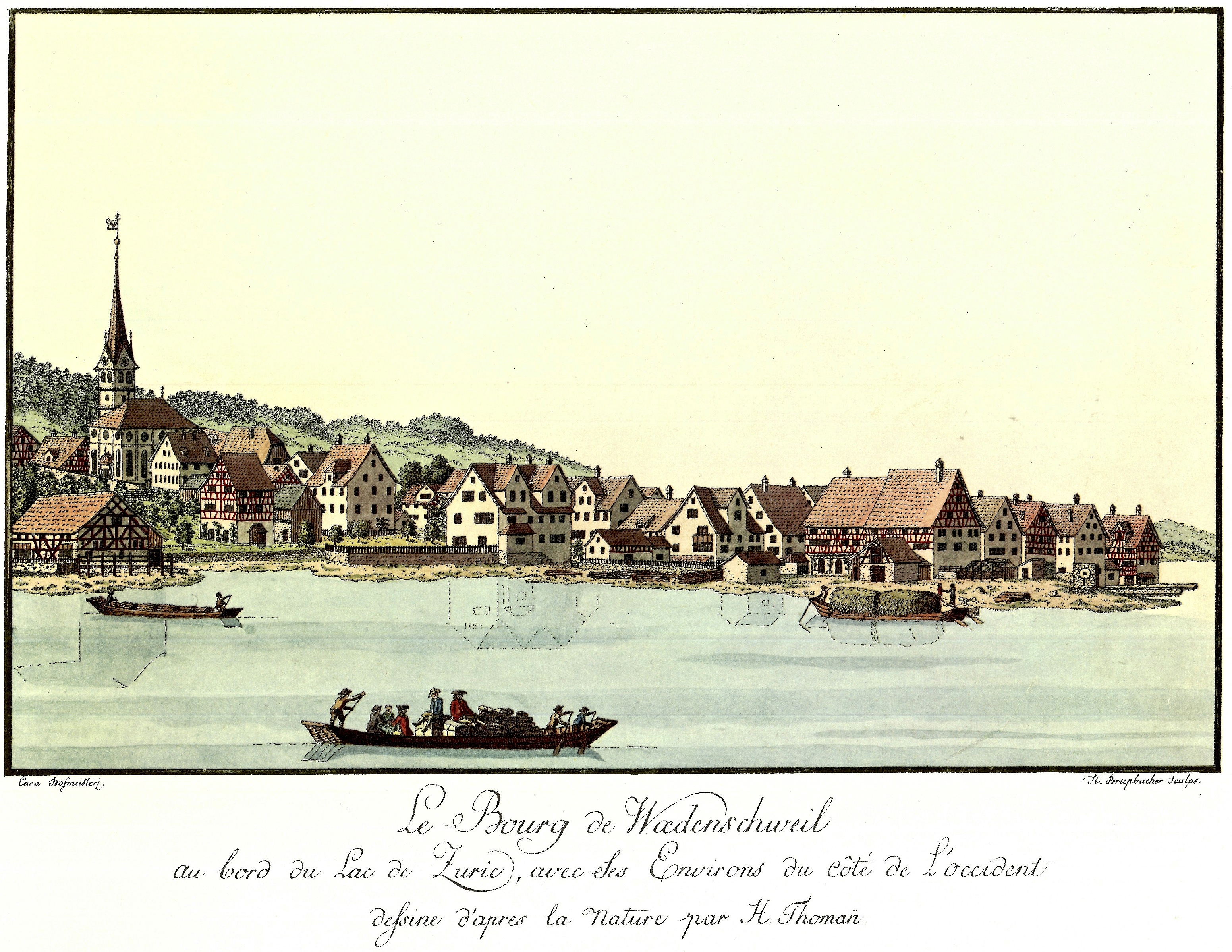 Stich von Heinrich Brupbacher (1758–1835): Wädenswil